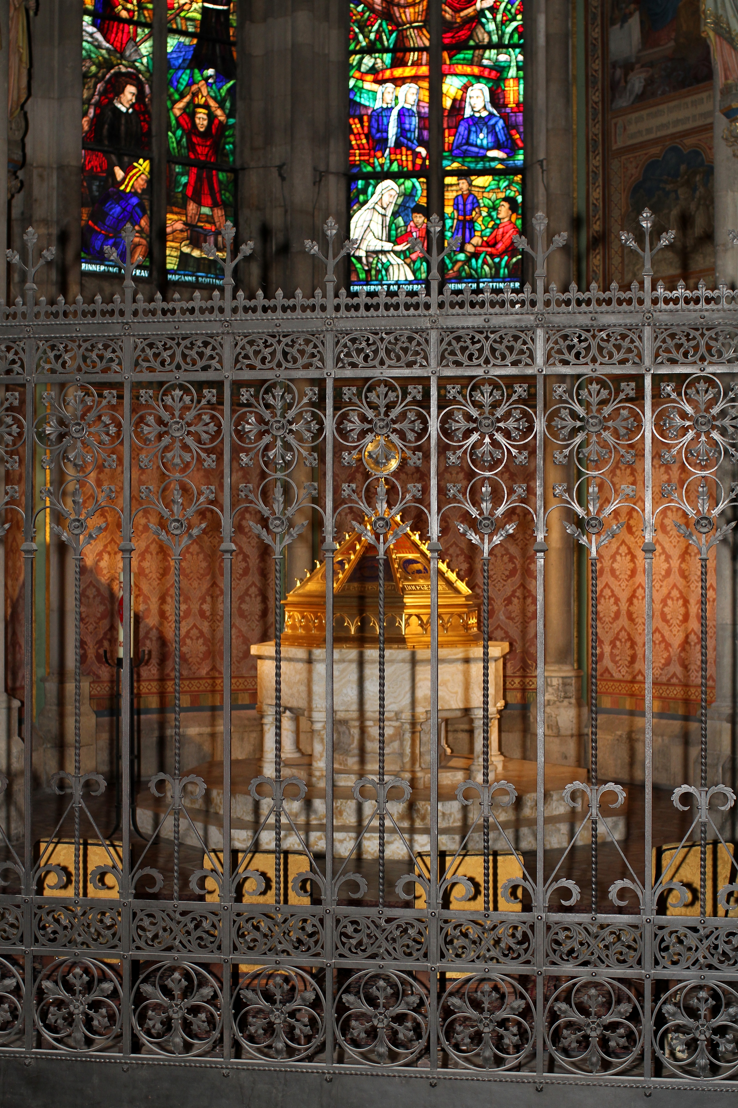 Die Taufkapelle der Wiener Votivkirche.